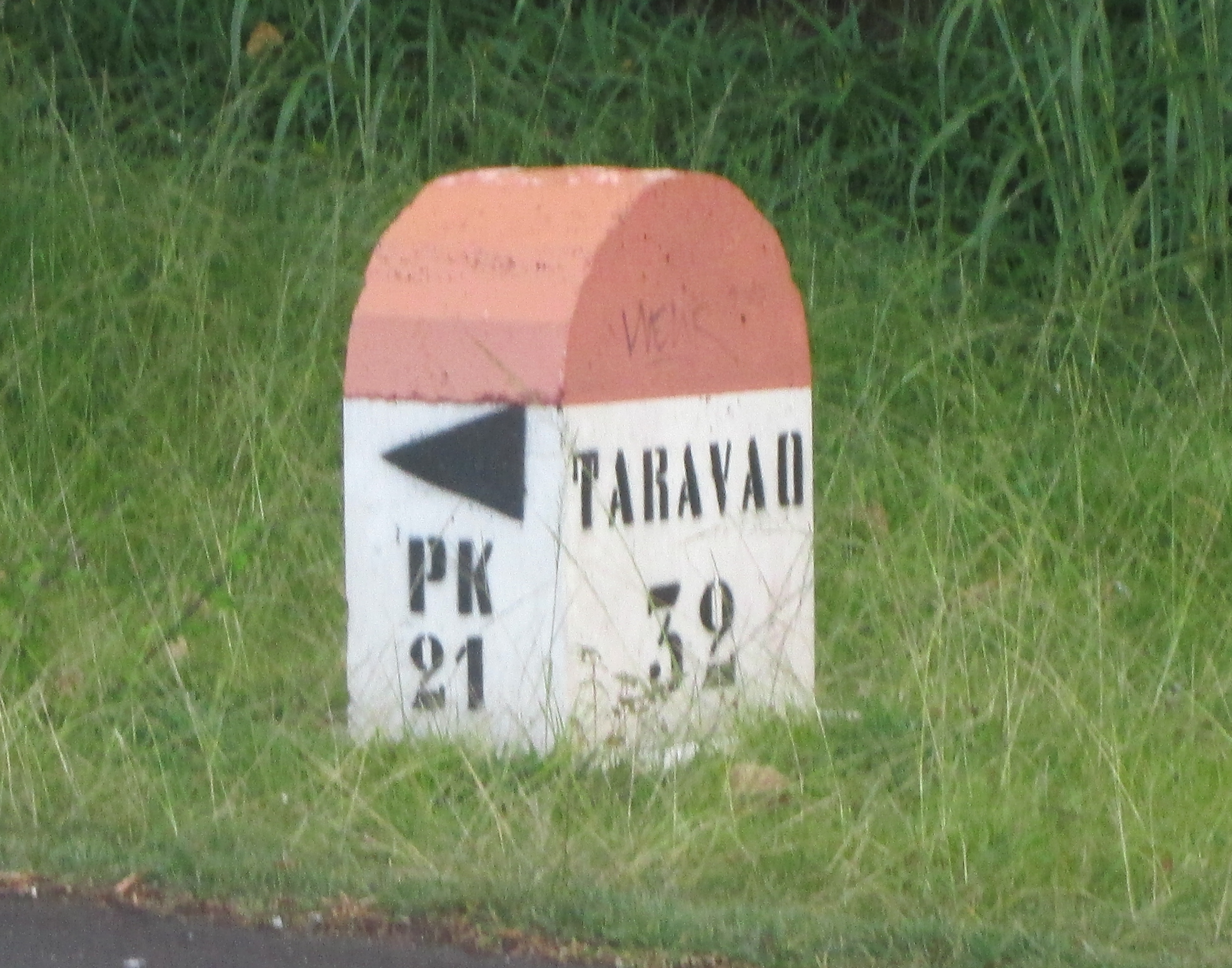 PK 21 côte est de Tahiti